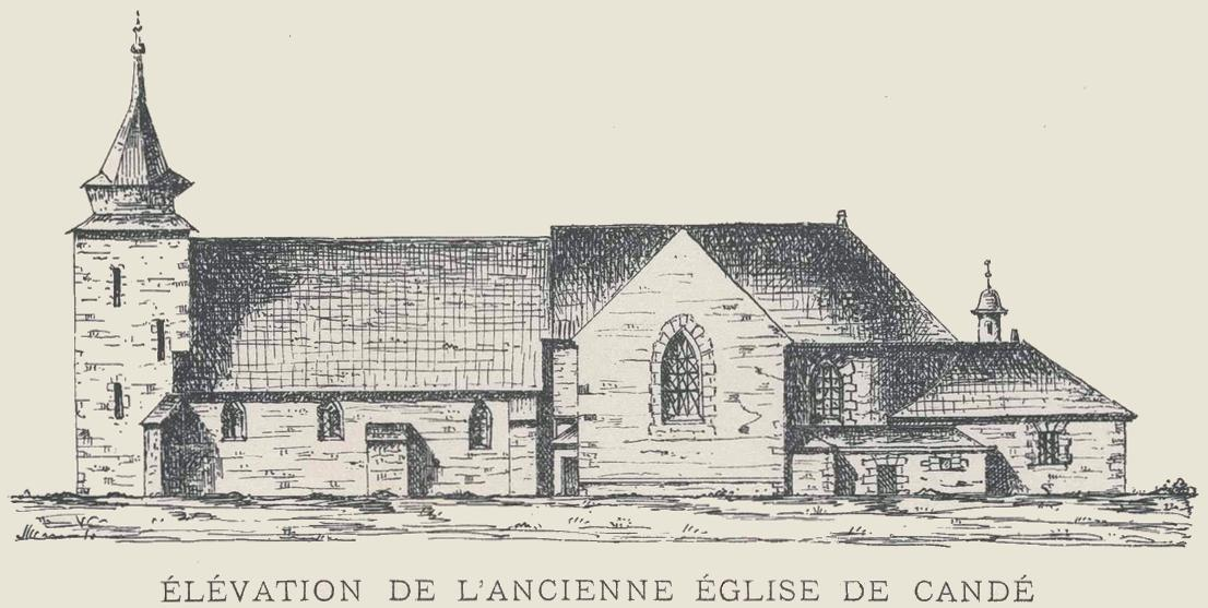 Vue de la façade sud de l'ancienne église de Candé, démolie au XIXème siècle.